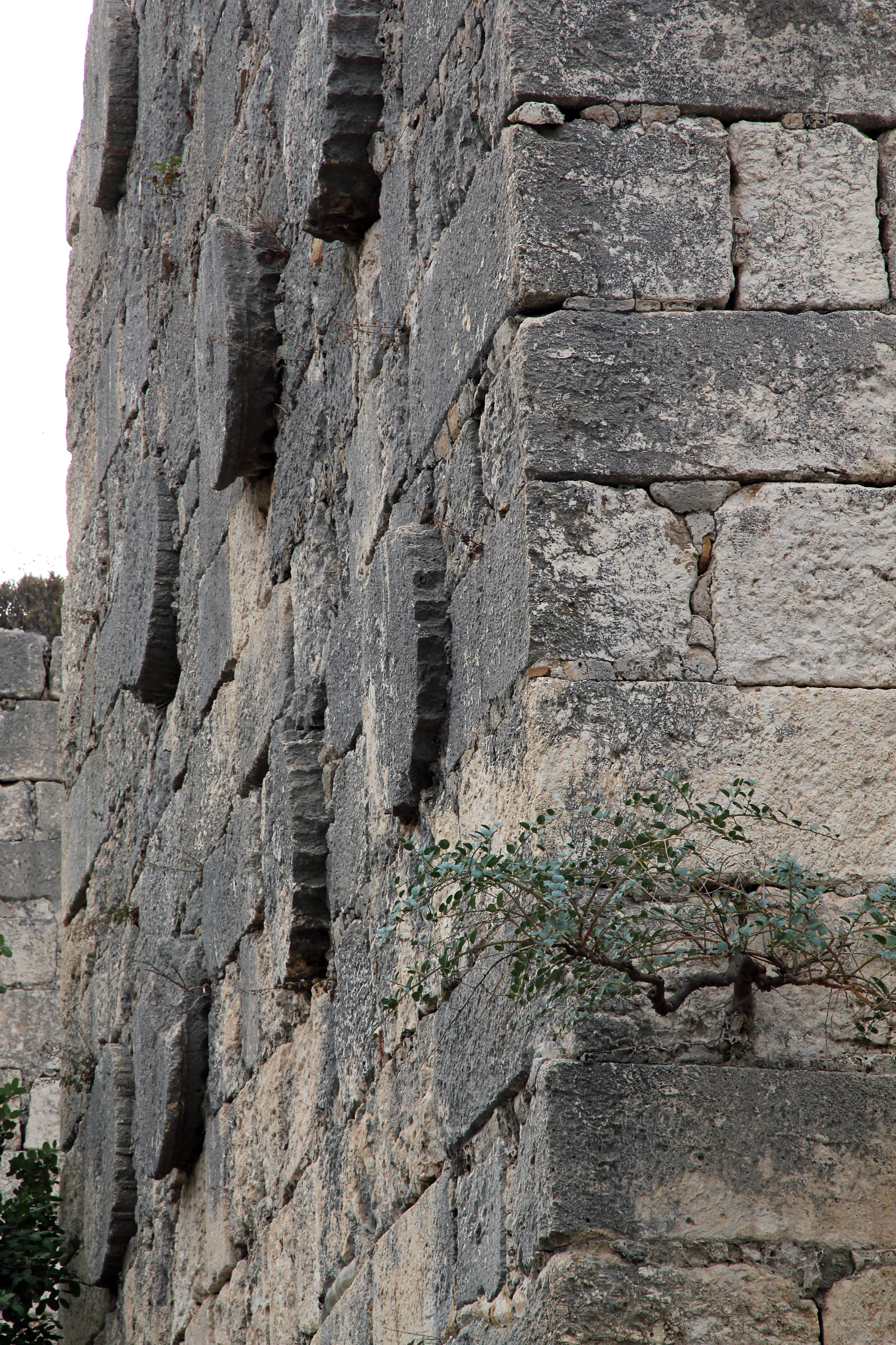 Korykos, Landburg bei Kızkalesi, Südtürkei, sichtbare Säulenschäfte als Spolien im Südostturm der Innenmauer